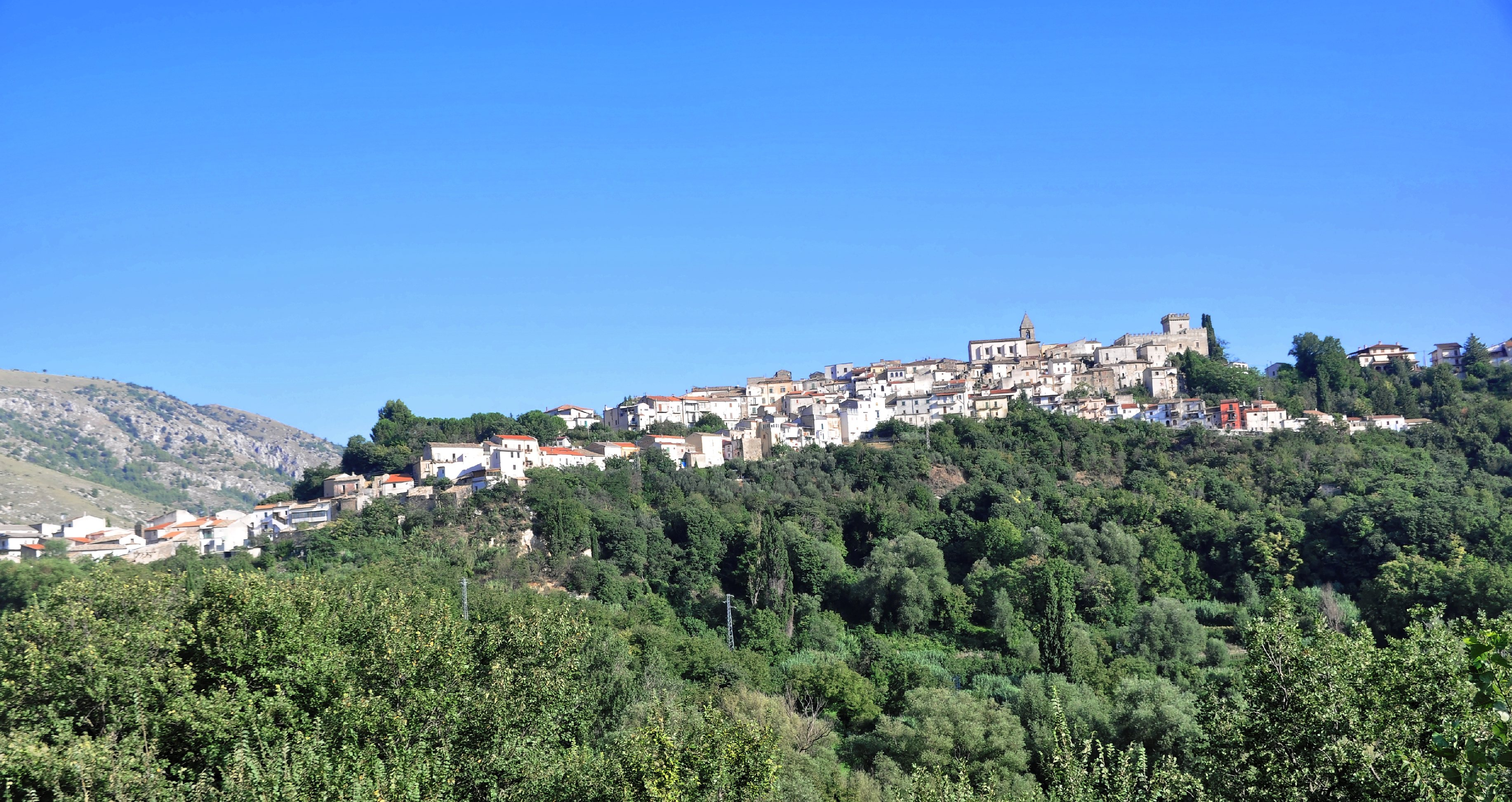 Bussi sul Tirino 2013